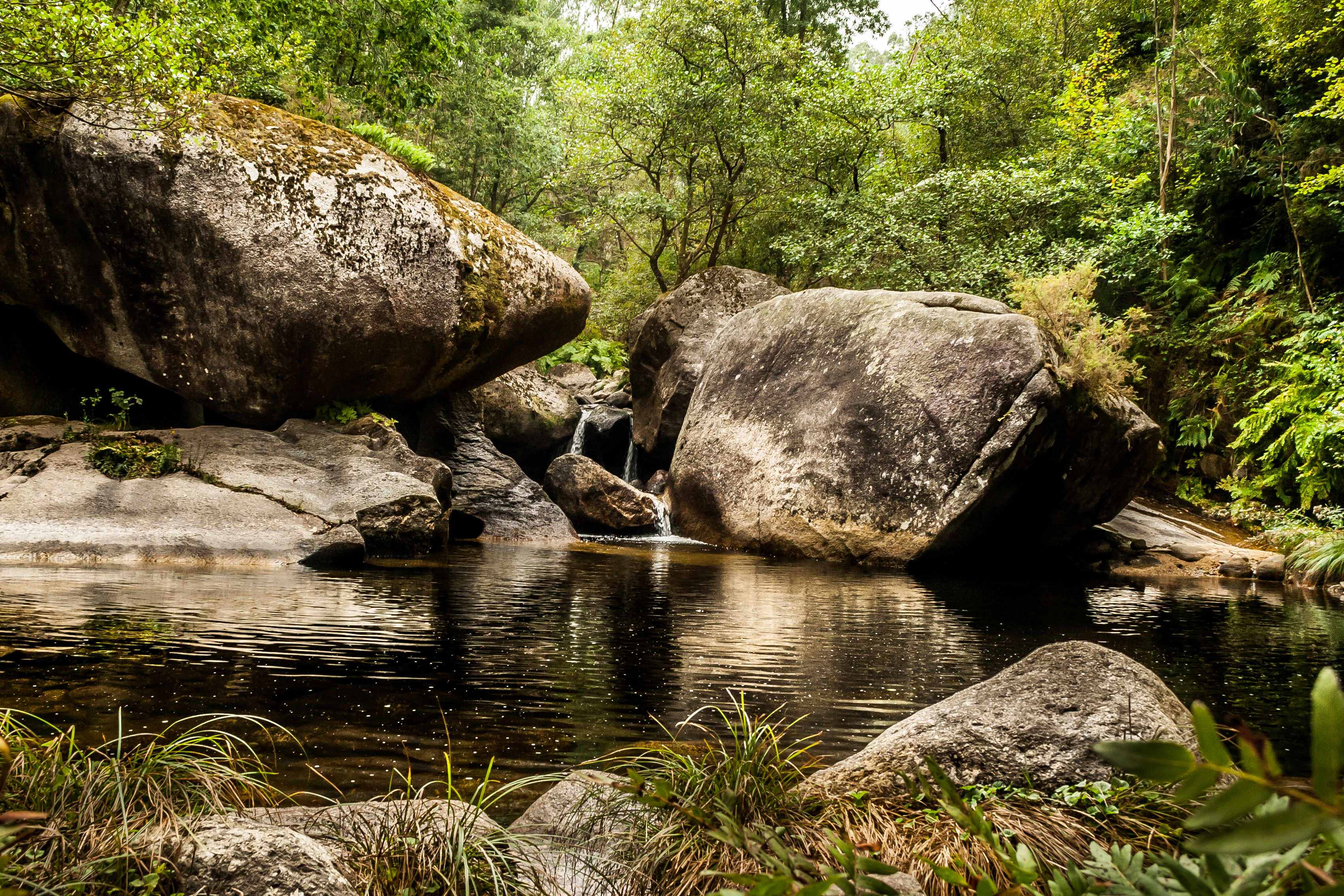 Fervenzas do Río Tronceda.